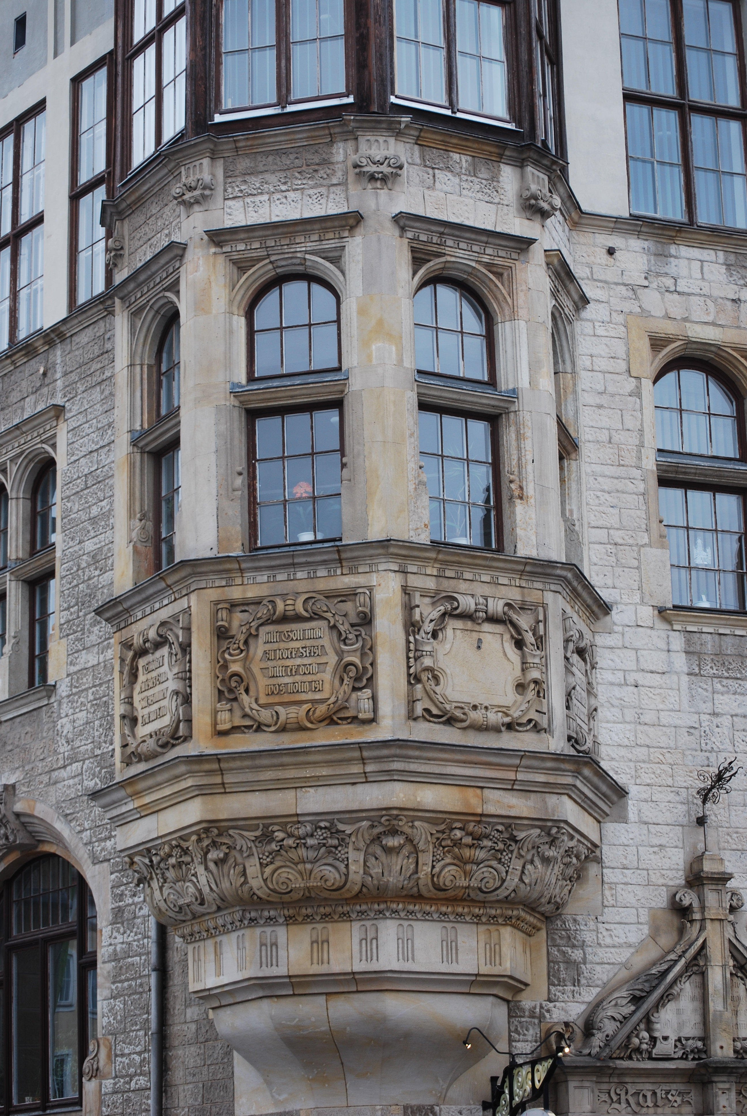 Rathaus Dessau Fassadendetail